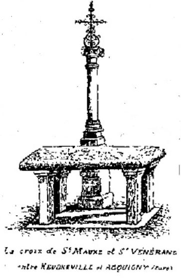 Dessin de la Croix de Saint Mauxe et Saint Vénérand à Acquigny paru en 1918 dans La chapelle de Saint-Éloi à Nassandres (Eure). Étude sur le culte des pierres, des sources et des arbres dans les départements de l’Eure, la Seine Inférieure et la Normandie de Léon Coutil